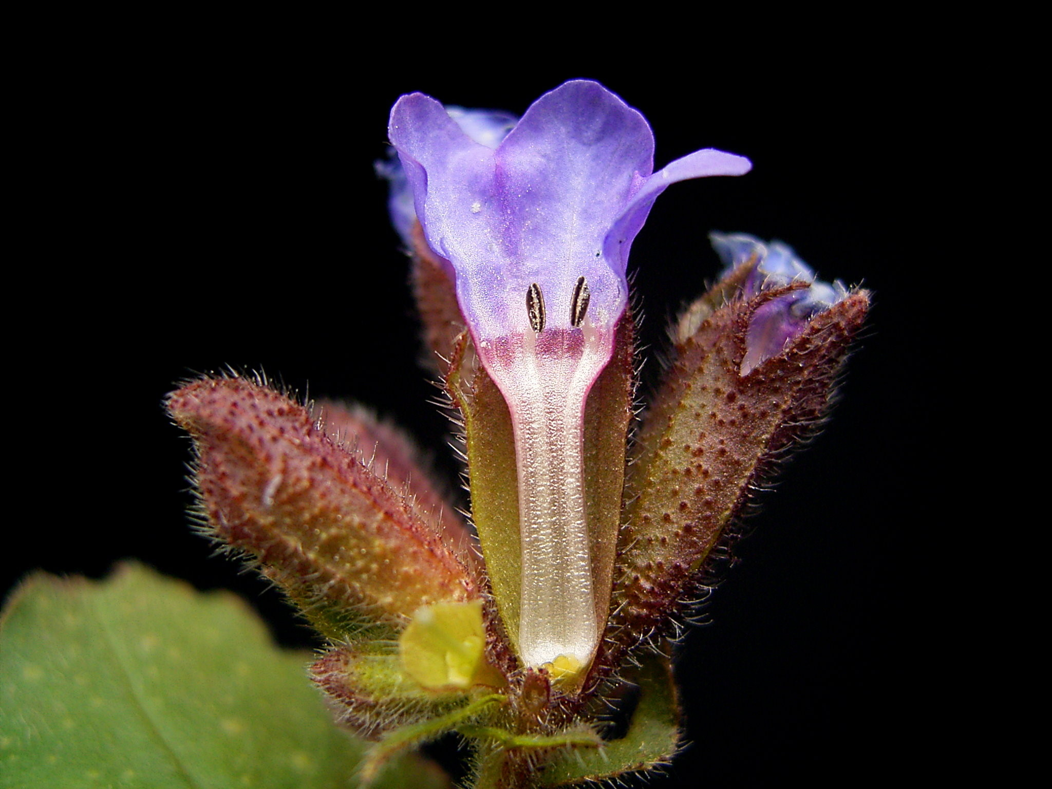 Pulmonaria officinalis